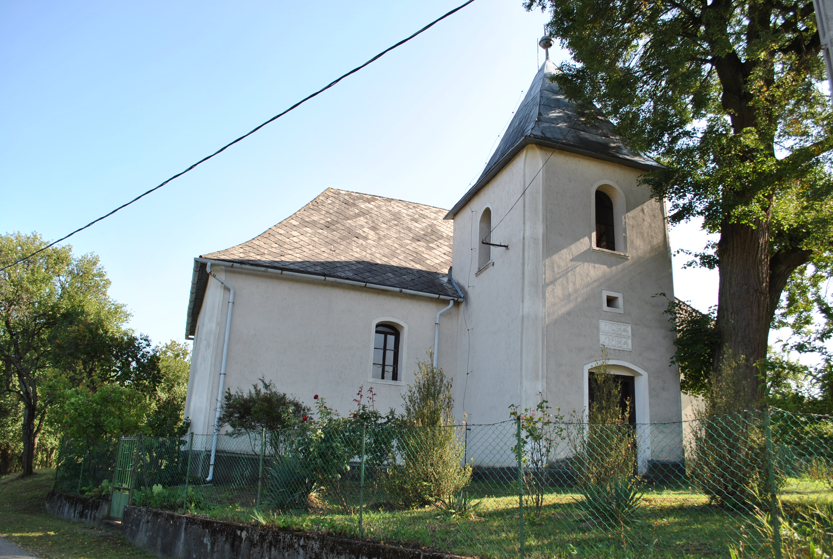 Református templom, Varbóc